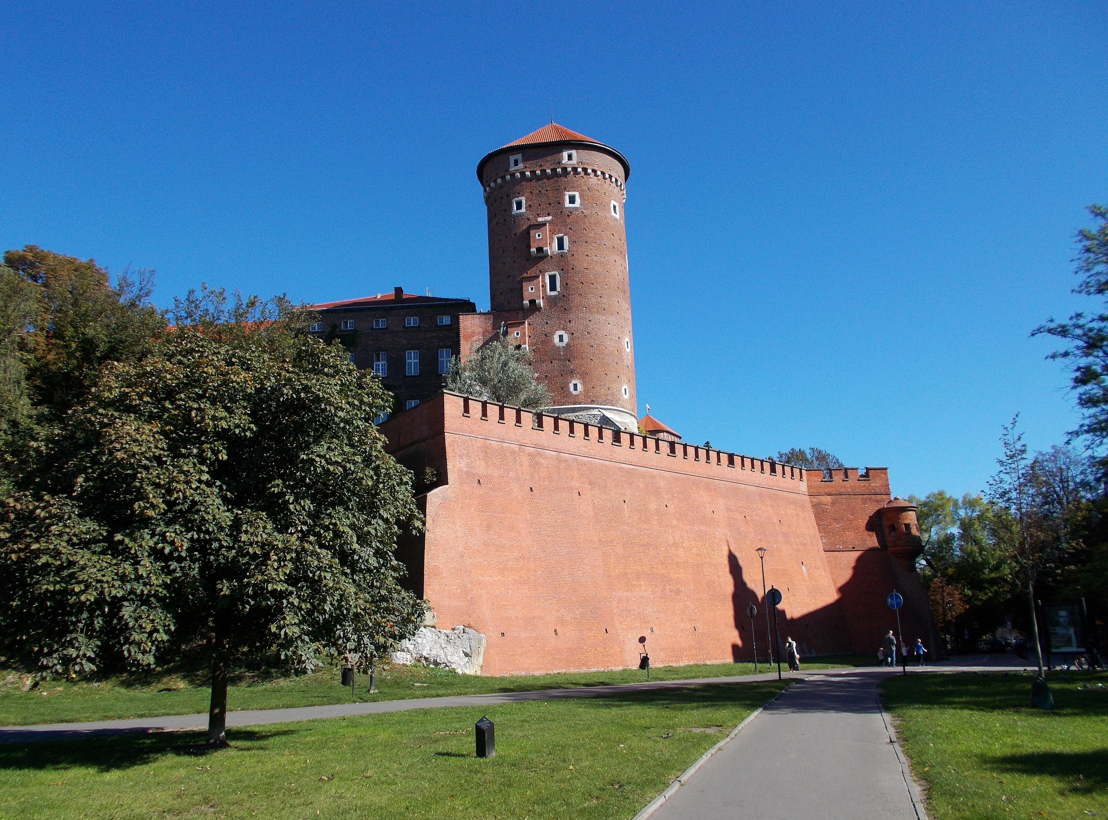 Krakau, denkmalgeschützter Sandomierska Turm (Polen)